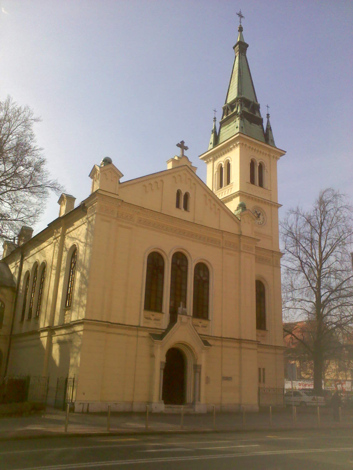 Evangeličanska cerkev Primoža Trubarja v Ljubljani